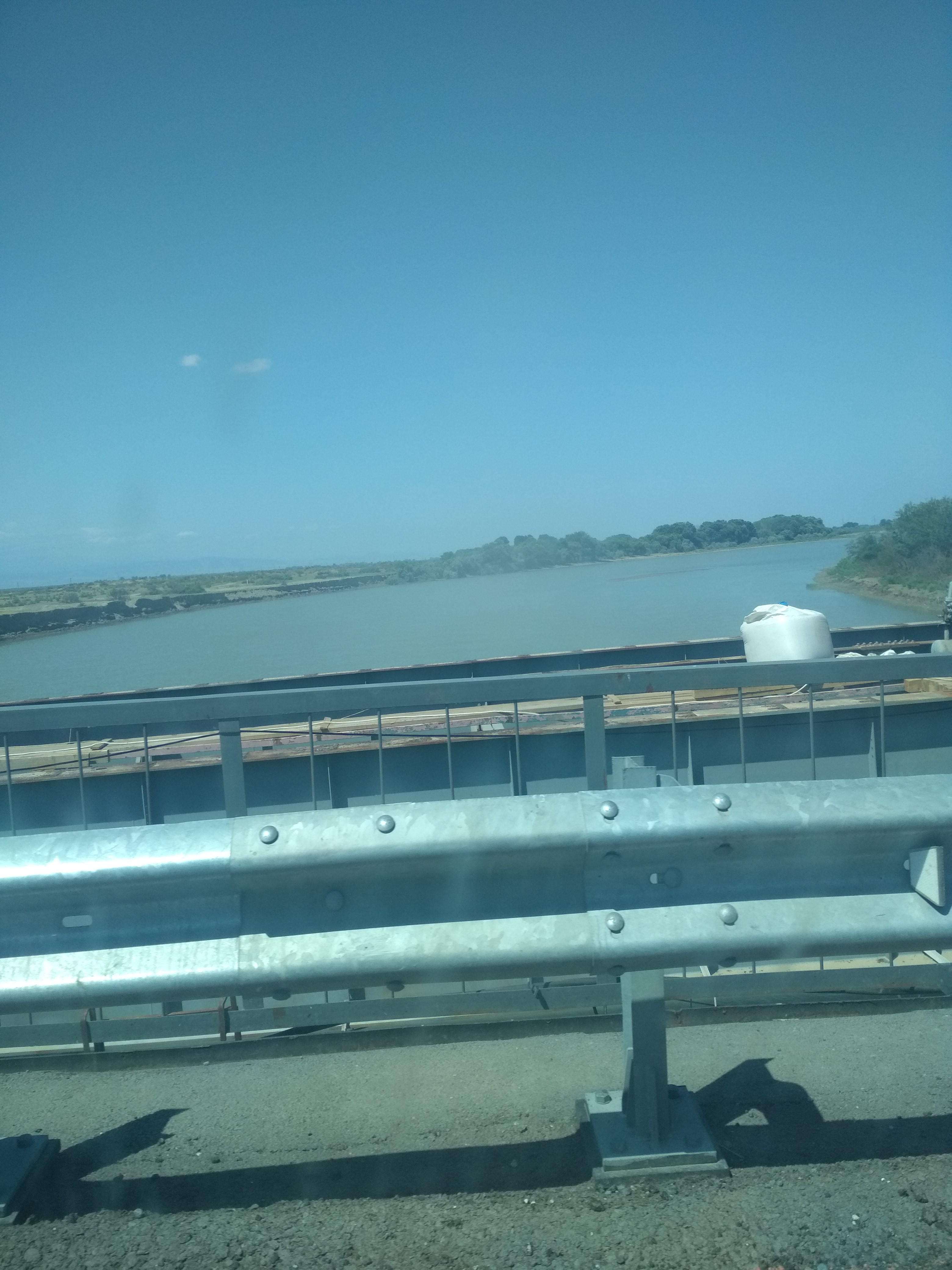 Нохчийн: ГӀой-хи ДегӀастанахь